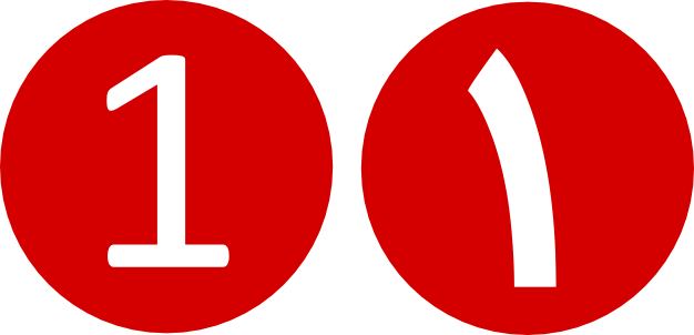 علامت خط 1 مترو تهران